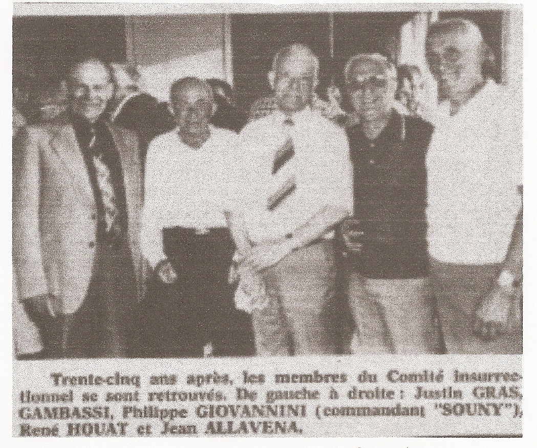 Photo du journal le patriote datant de 1979